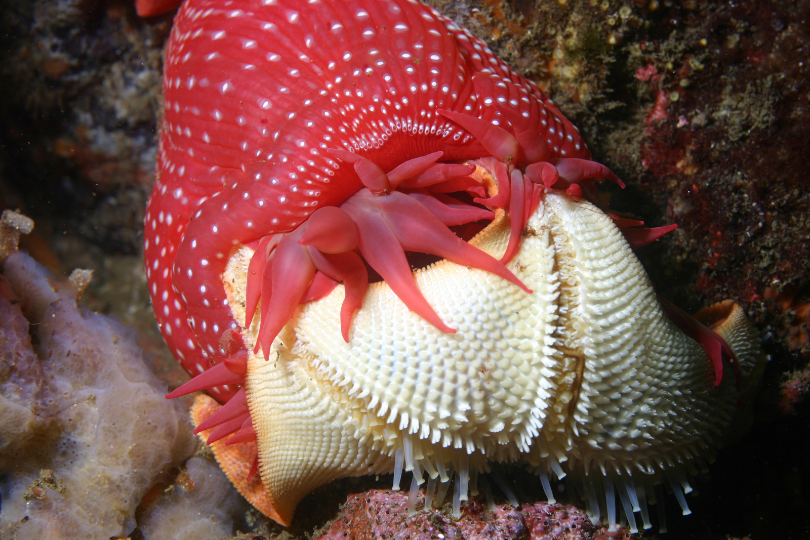 Anémona Urticina lofotensis comiendo una estrella de mar Asterina miniata. Pebble Beach, EE.UU.